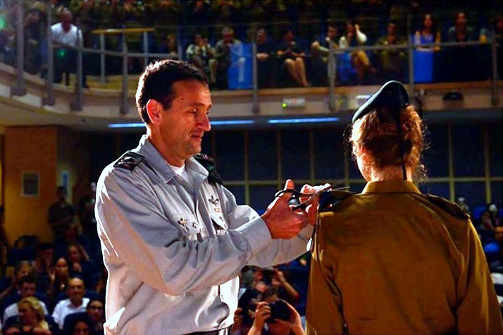 טקס חשיפת הדרגות במעמד ראמ״ן האלוף הרצל (הרצי) הלוי, במלאת שלוש שנות הכשרה